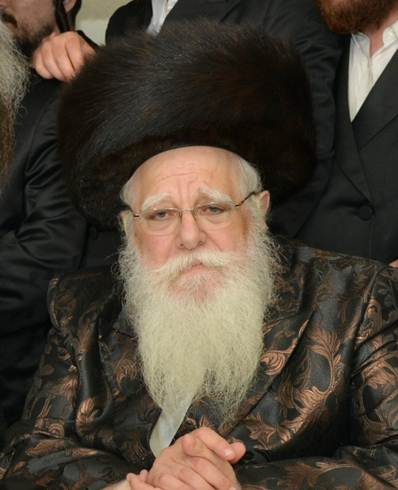 האדמור משאץ ויז'ניץ